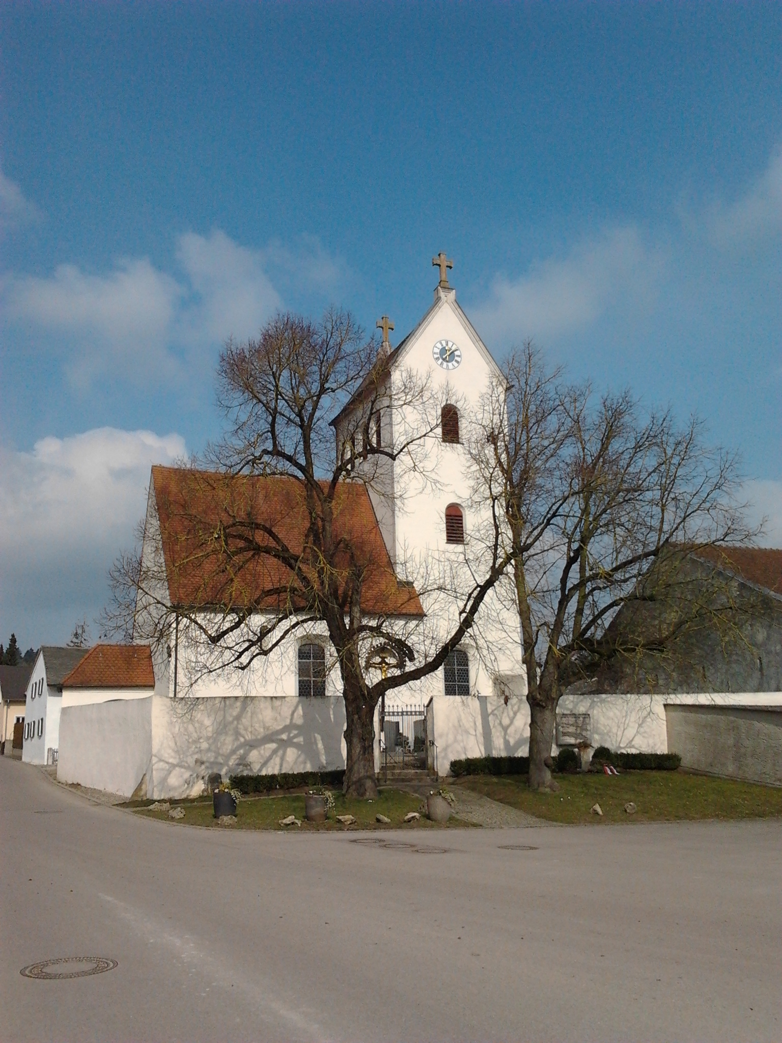 Lindenstraße 17 Landershofen: Kirche Sankt Benedikt.